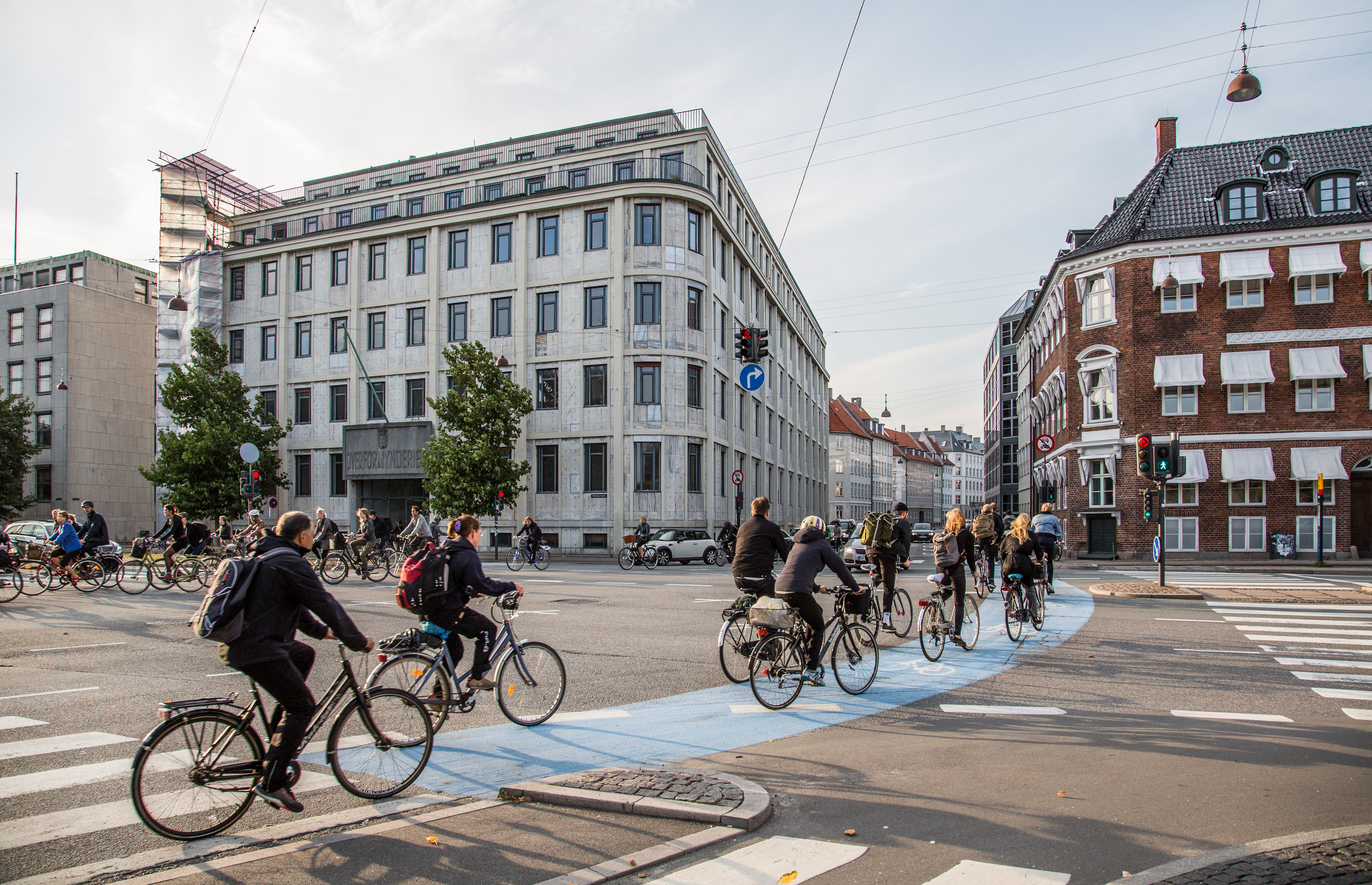 Copenhagen, Denmark